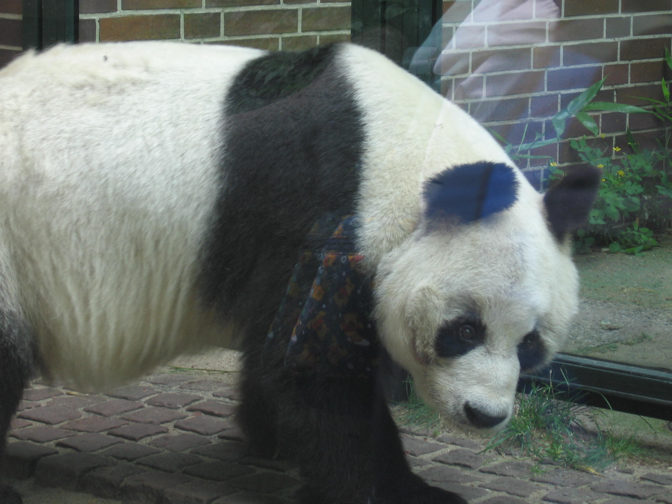 giant panda